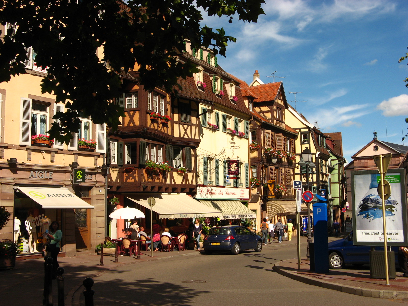 Colmar, Place Jeanne d'Arc, vers la rue de la Grenouillère